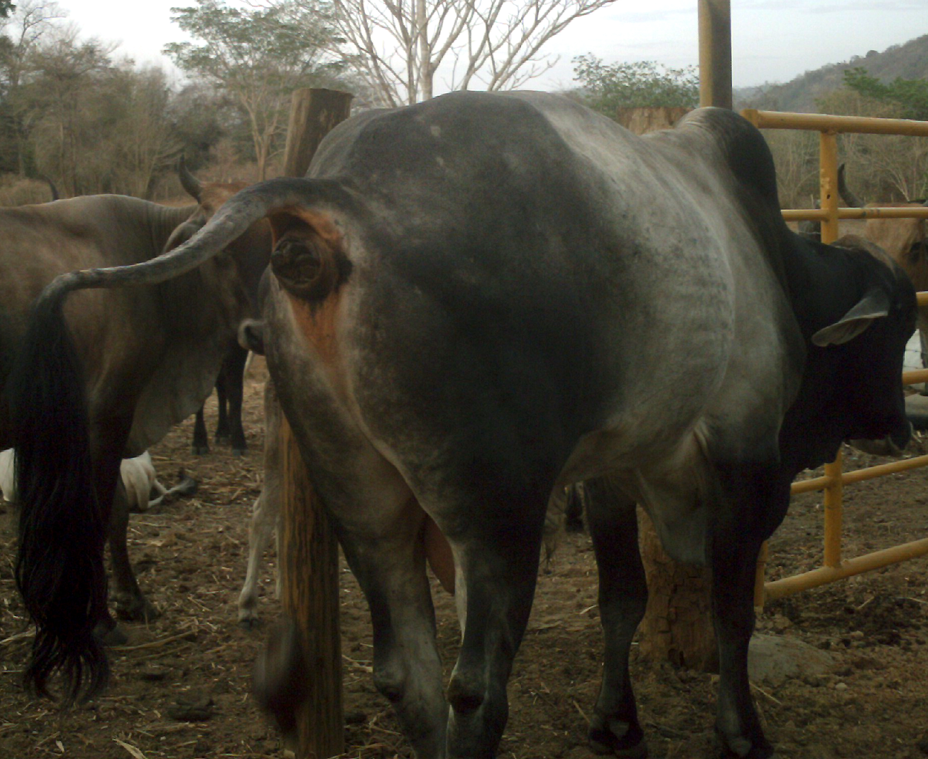 Vaca defecando, Estado Miranda, Venezuela.